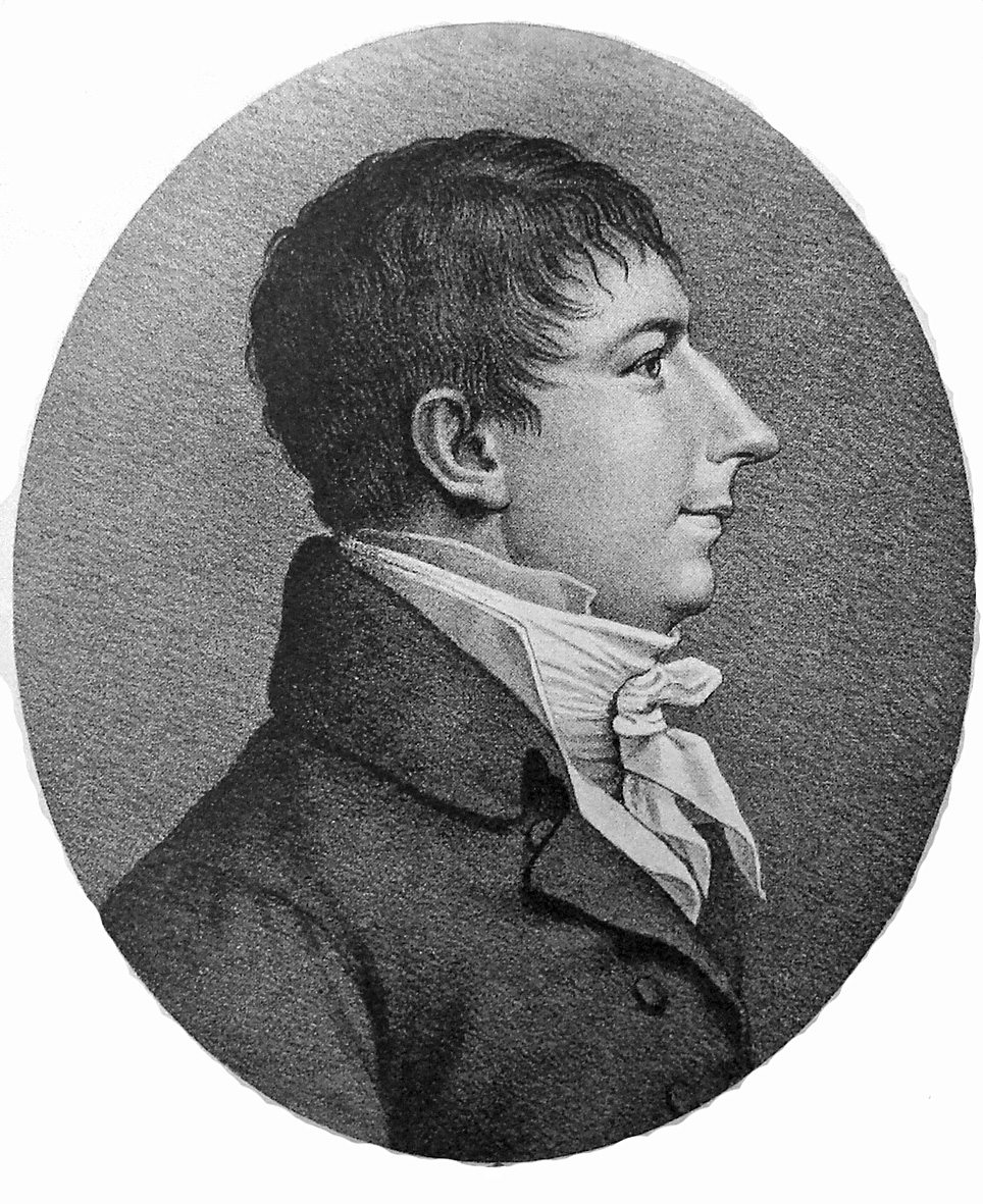 Christopher Ernst Friedrich Weyse, bedre kendt som C.E.F. Weyse (5. marts 1774 i Altona – 8. oktober 1842 i København) var en tysk-dansk komponist og organist. Han er mest kendt for sine sange og salmer til tekster af N.F.S. Grundtvig og B.S. Ingemann.